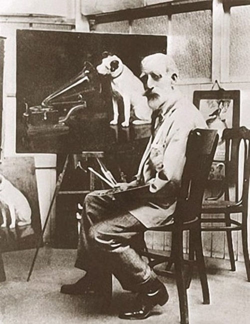 Francis Barraud painting.